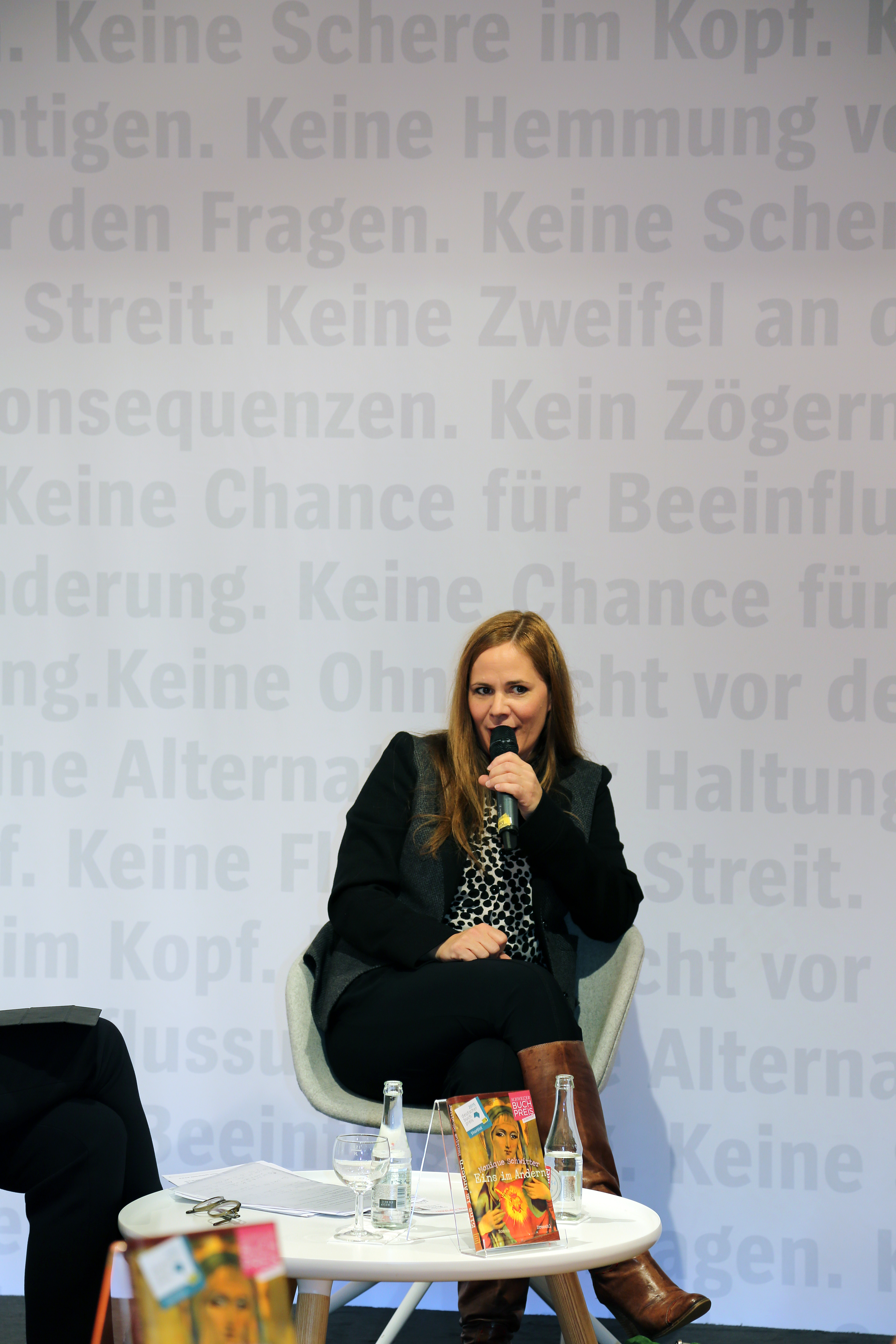 Monique Schwitter bei der Frankfurter Buchmesse 2015